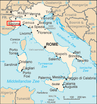 Oorspronkelijk uit CIA Factbook; vertaald in Nederlands door Danielm; omgezet in PNG door BenTels + verbetering spelling ; enkel Savona met rood gemarkeerd door mij